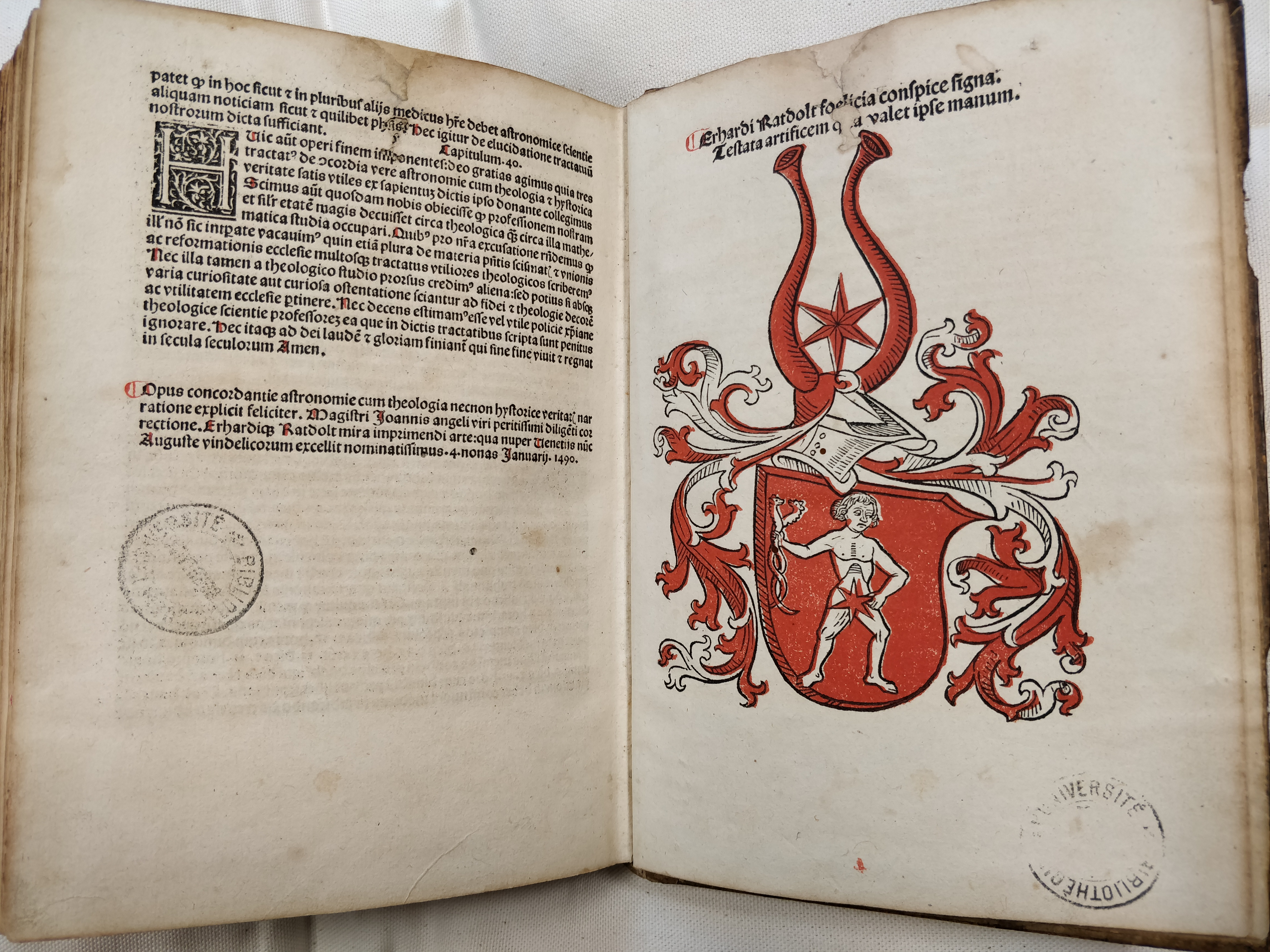 Colophon et marque d'imprimeur rubriqués. Titre de l'oeuvre: "Concordantia astronomiae cum theologia concordantia astronomie cum historica narratione. Et elucidarium duorum precedentium: domini Petri de Aliaco cardinalis Cameracensis". Ailly, Pierre d' (1351-1420). Auteur Engel, Johann (1463-1512). Éditeur scientifique Ratdolt, Erhard (1447-1528). Imprimeur / Imprimeur-libraire Imprimé en 1490 à Augsburg. Texte en latin. Disponible à la Bibliothèque universitaire de Bordeaux